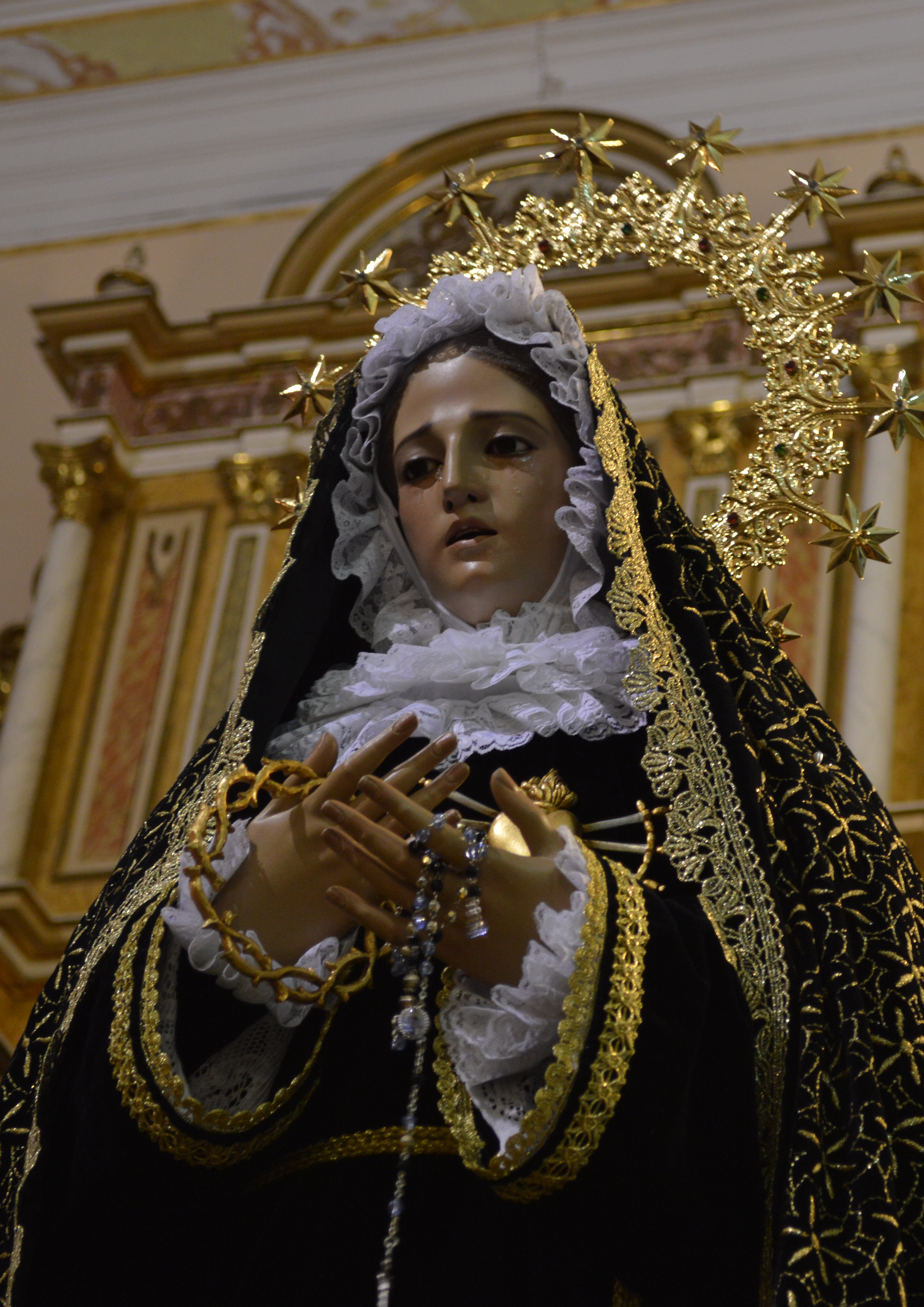 Virgen de los Dolores de Pedralba